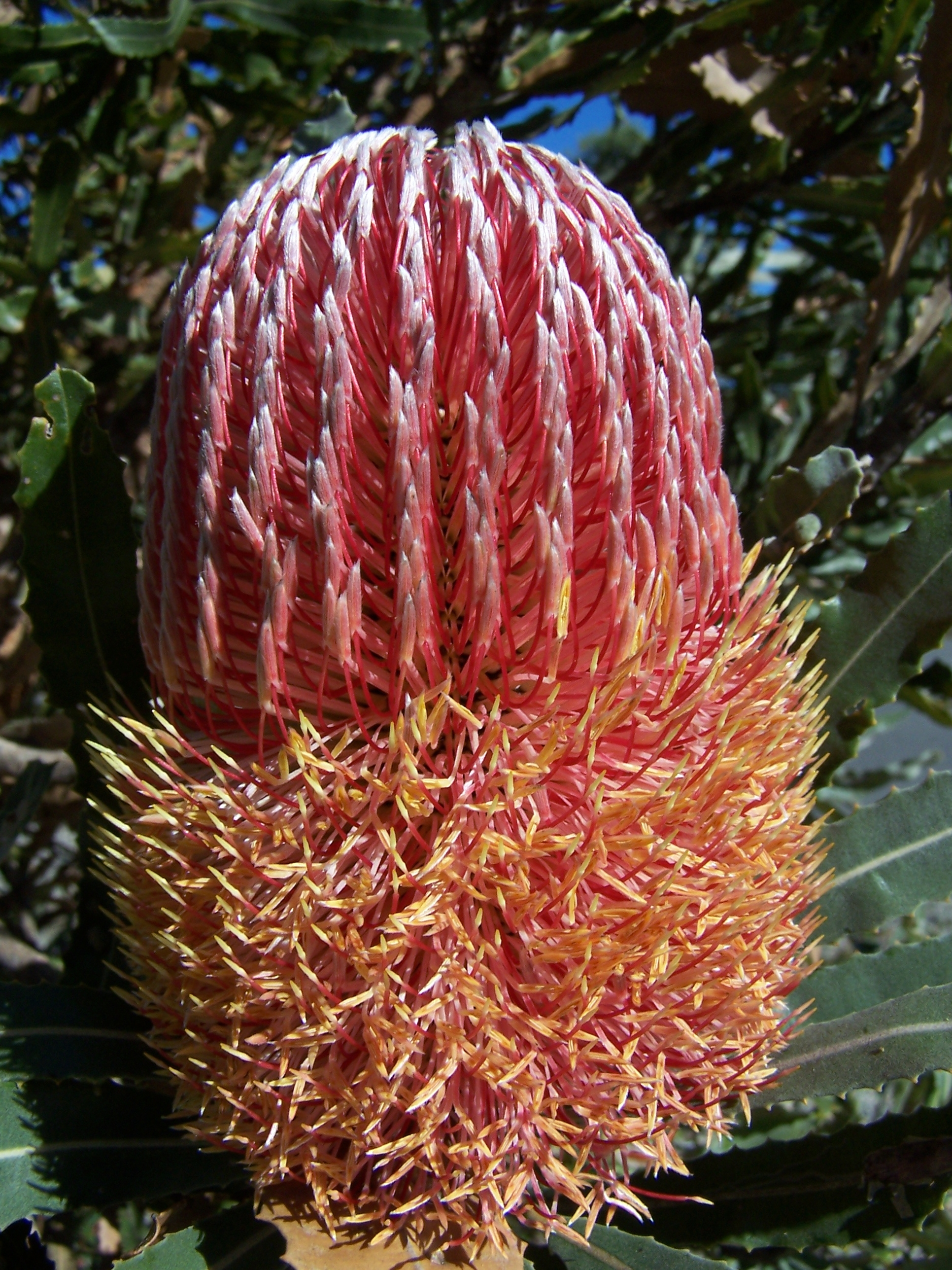 Banksa menziesii, taken in Jandakot Botanical Gardens